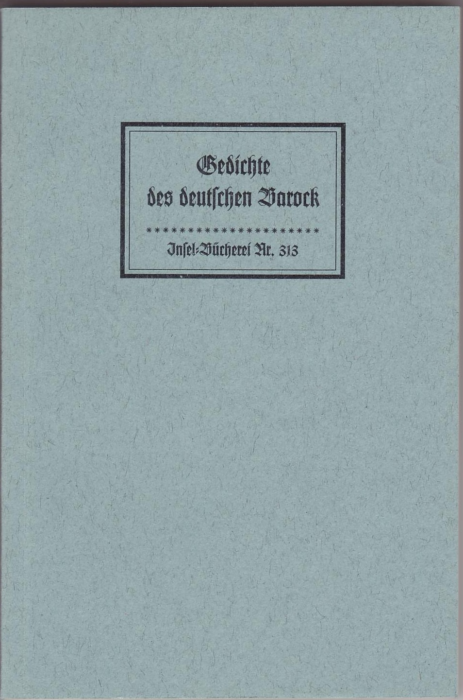 IB 313 Nachruck